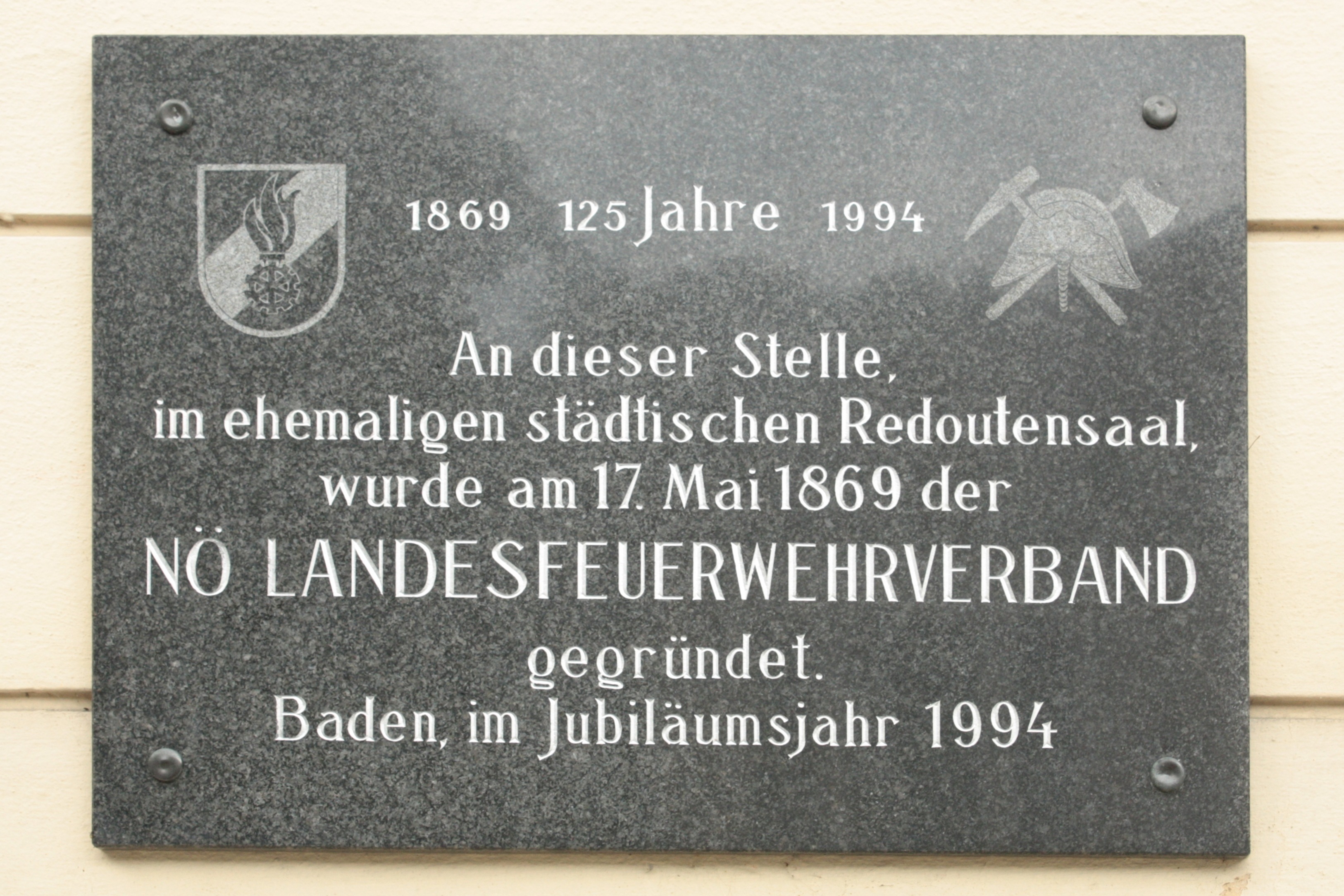 Gedenktafel des NÖ Landesfeuerwehrverbandes in Baden (Niederösterreich), Pfarrplatz 1–3, Fassade zum Kaiser-Franz-Ring